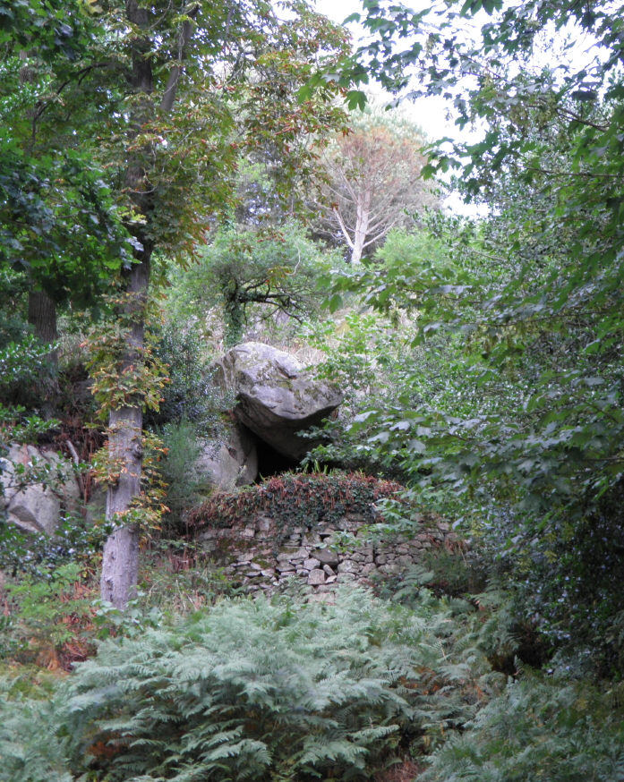 Grotte d'Héloïse. Hommage à Héloïse et Abélard, ce dernier étant né au Palet tout proche. La Garenne Lemot, Gétigné - Clisson, Loire-Atlantique, France.